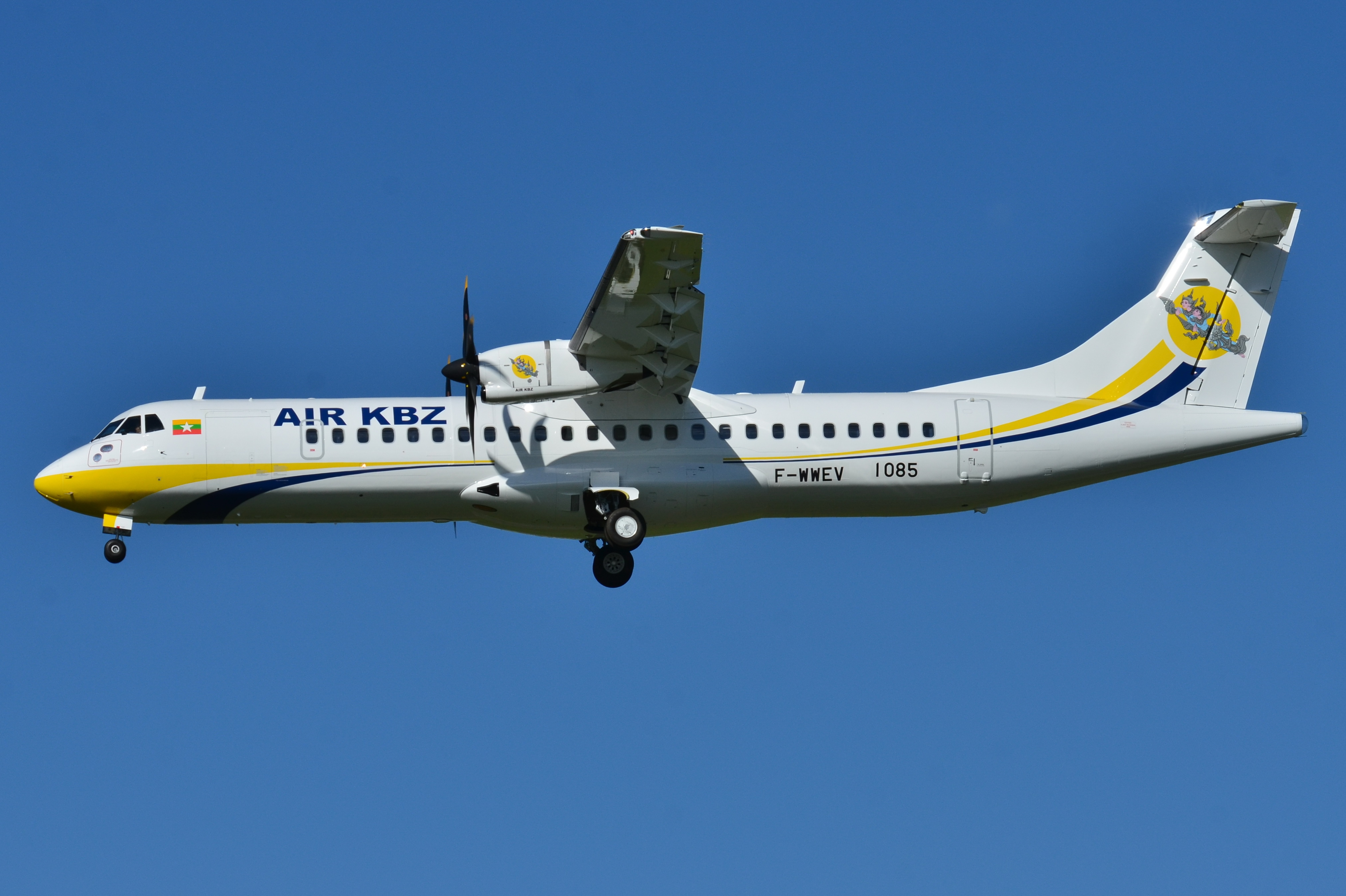 Photo prise à l'aéroport de Toulouse-Blagnac (LFBO) en France. Picture take at Toulouse-Blagnac Airport (LFBO) in France.